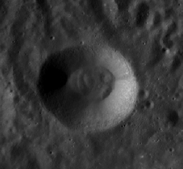 Cráter lunar Sherrington. (Imagen LRO)